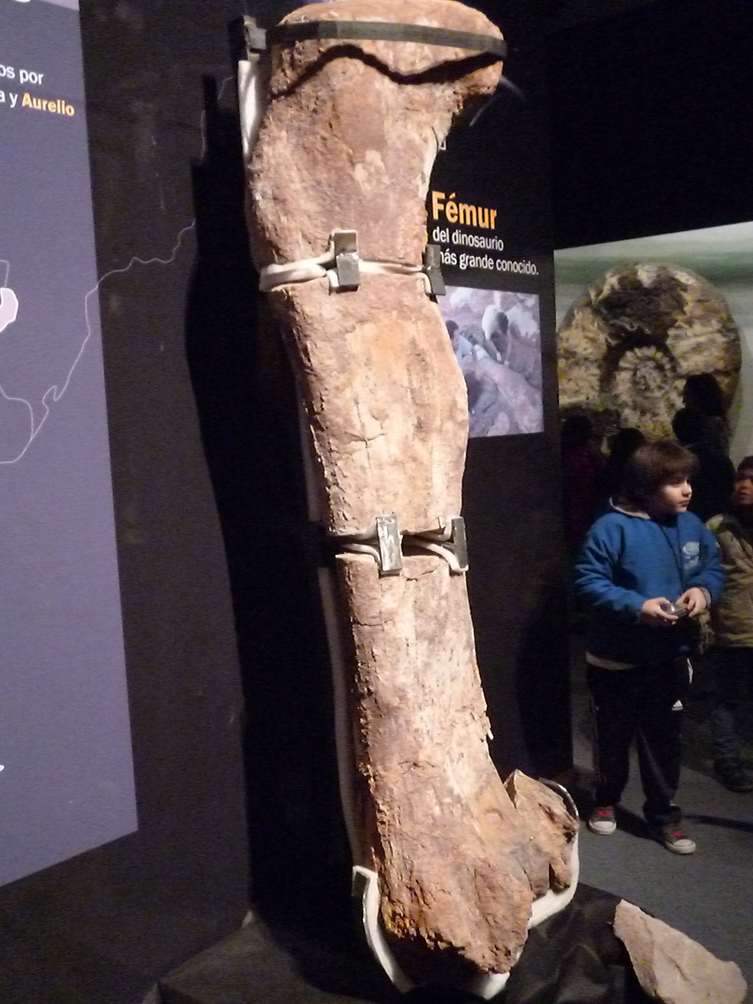 Fósiles del titanosauria del Chubut en el Museo Egidio Feruglio de Trelew, Chubut, Argentina. Descubiertos en 2013 y presentados en 2014, supuestamente se trata del animal terrestre más grande de la historia de la Tierra. Pesaría 4 toneladas más que el Argentinosaurus y su fémur mide más de dos metros.